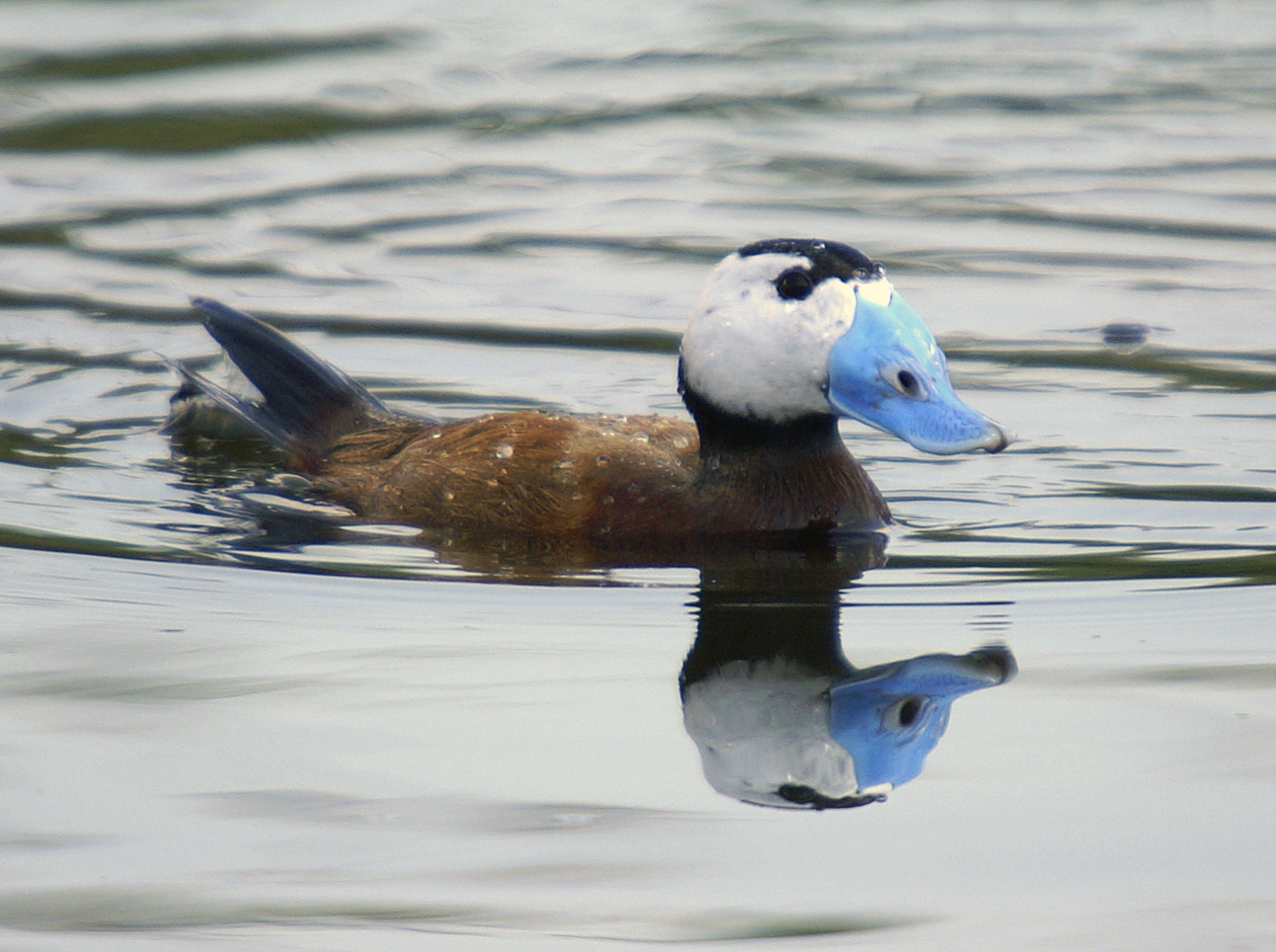 Malvasía cabeciblanca - Ànec cap-blanc - White-headed Duck - Oxyura leucocephala, male, Clot-de-Galvany, Alicante, España